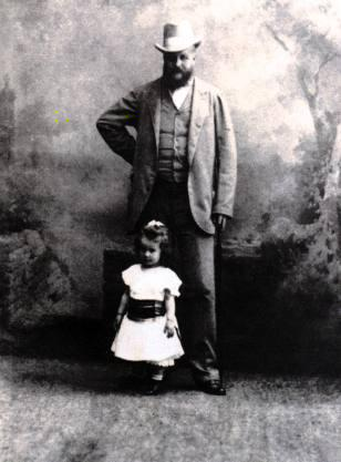 Karol Lanckoroński z dcerou Karolinou, asi 1900.